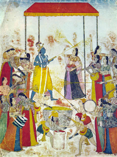 Reproduction d'une miniature indienne représentant le festival de la holî